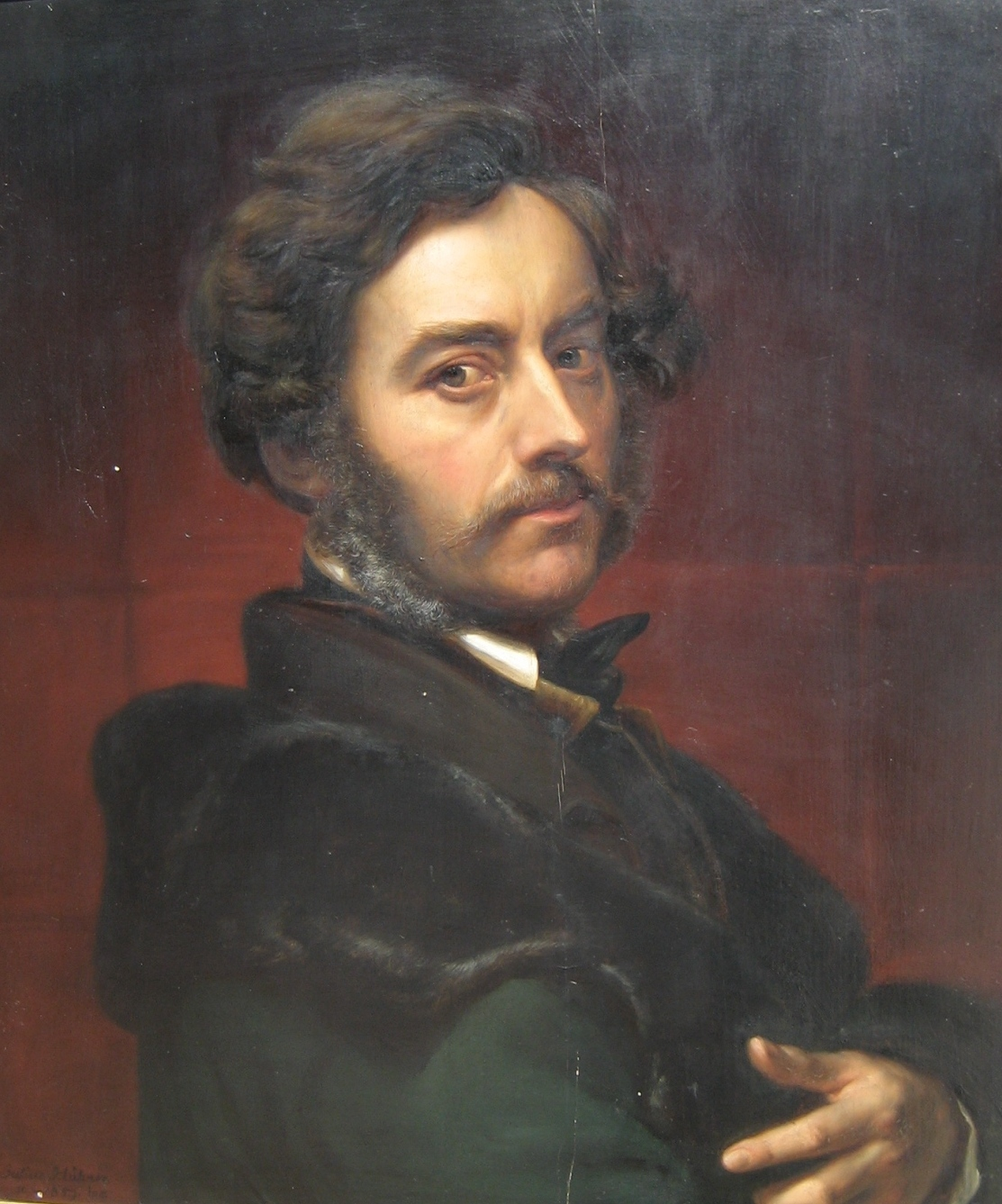 Julius Hübner Selbstportrait von 1859 - Privatbesitz